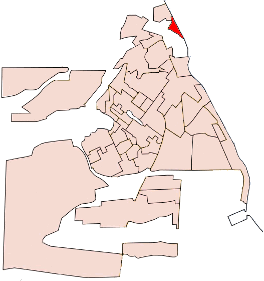 Barrio Mar del Plata